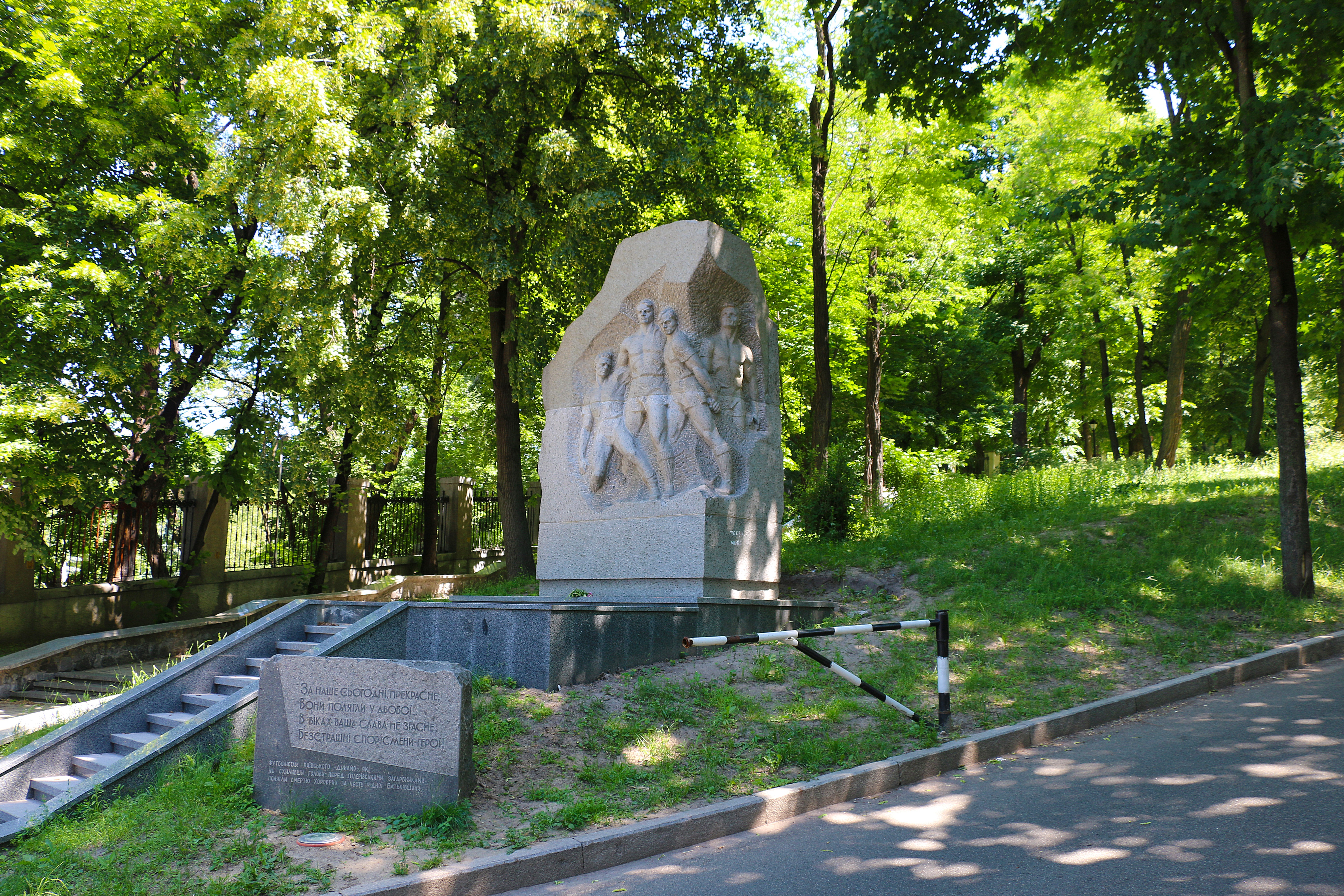 Пам'ятник футболістам київського «Динамо» — учасникам легендарного «Матчу смерті» в роки Великої Вітчизняної війни, Київ, Грушевського Михайла вул., 3